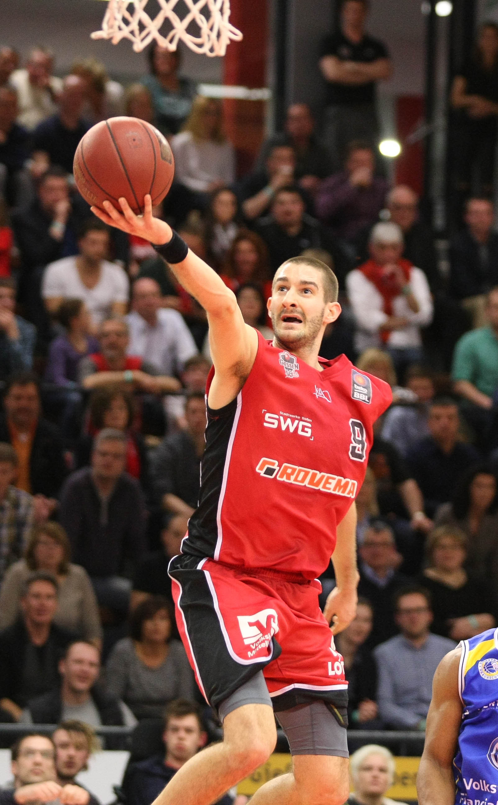 Giessen 46ers / Basketball Löwen Braunschweig (73-71)